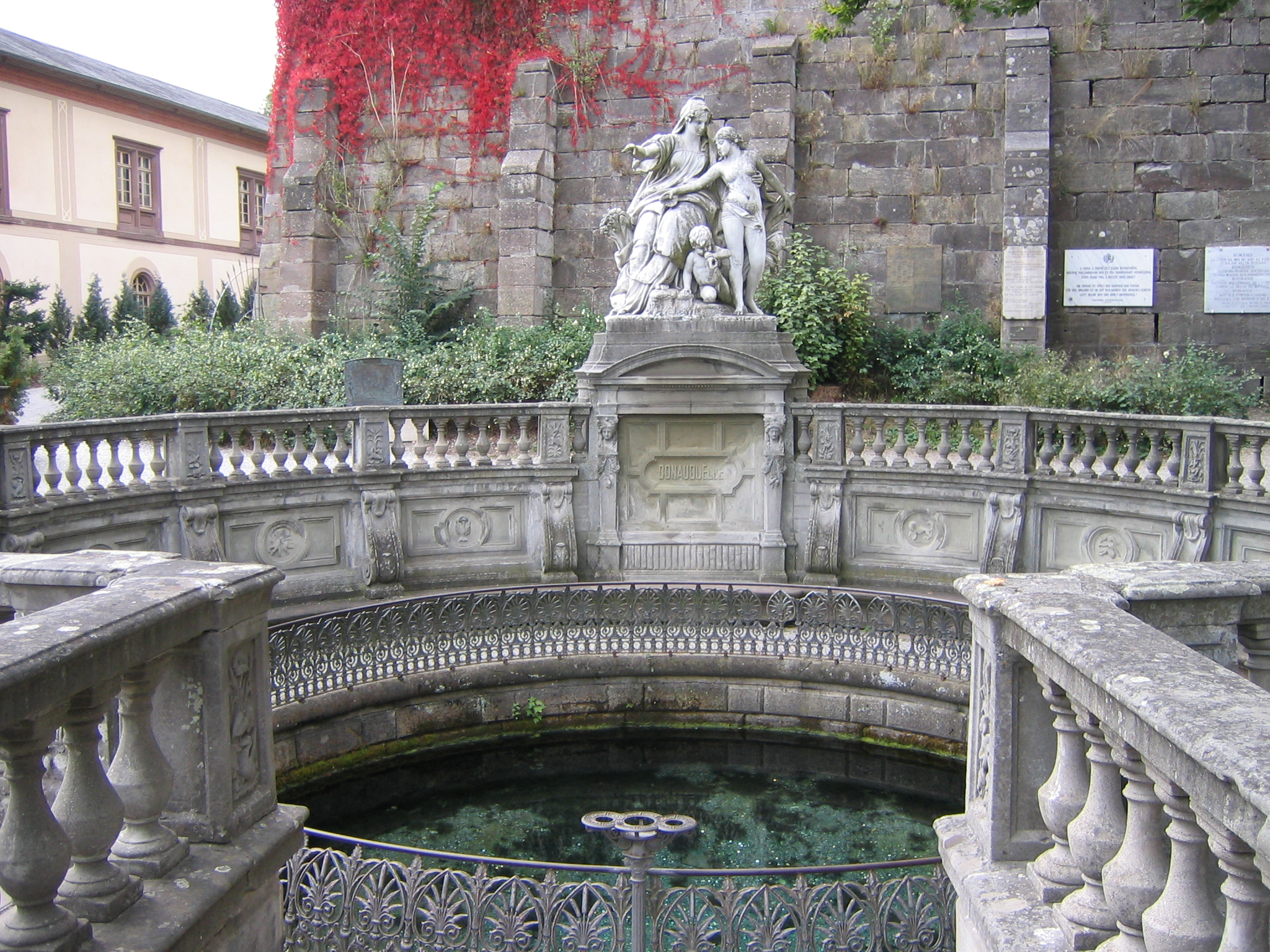 Donauquelle in Donaueschingen